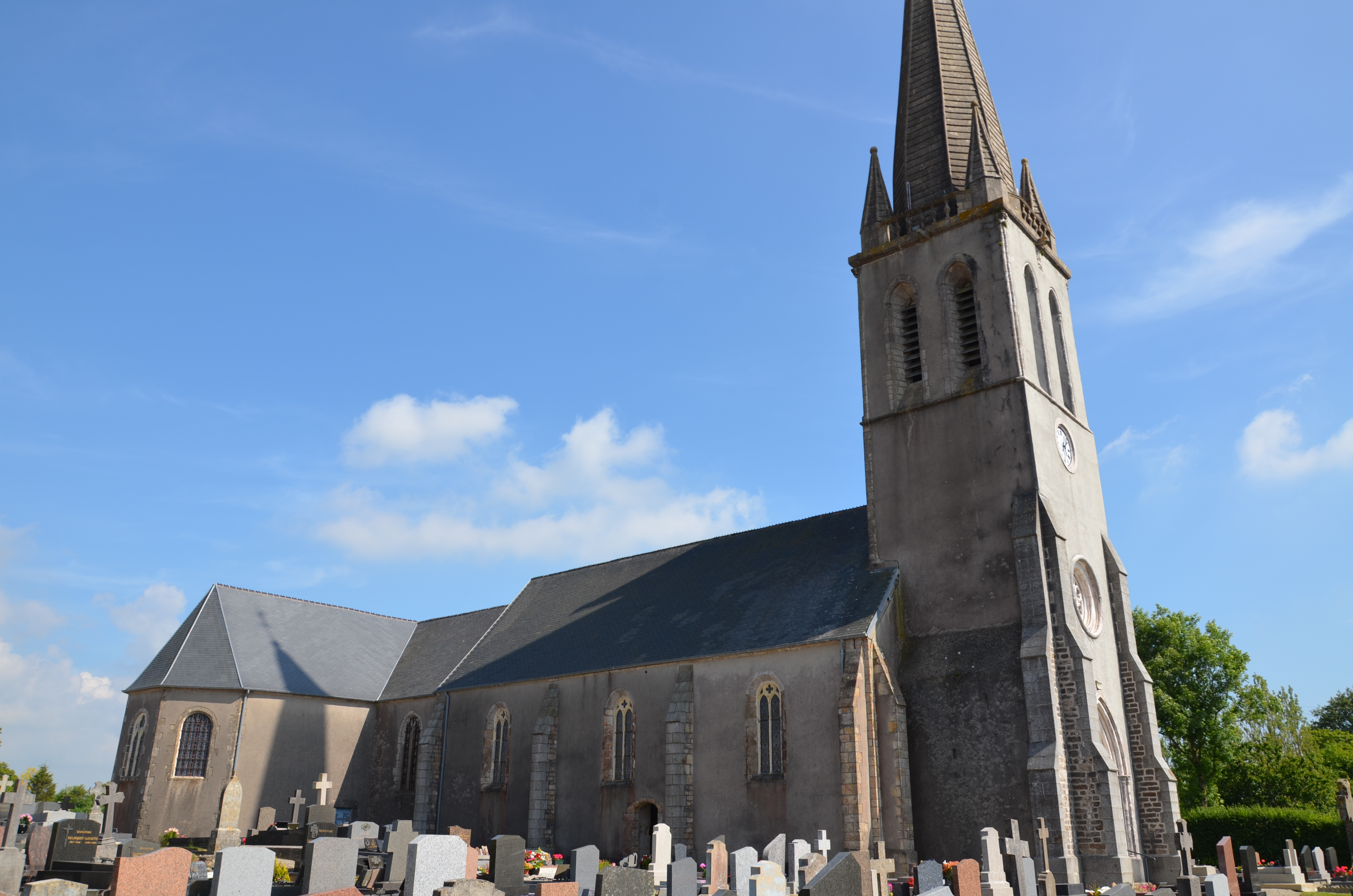 Église Notre-Dame de Quettetot.